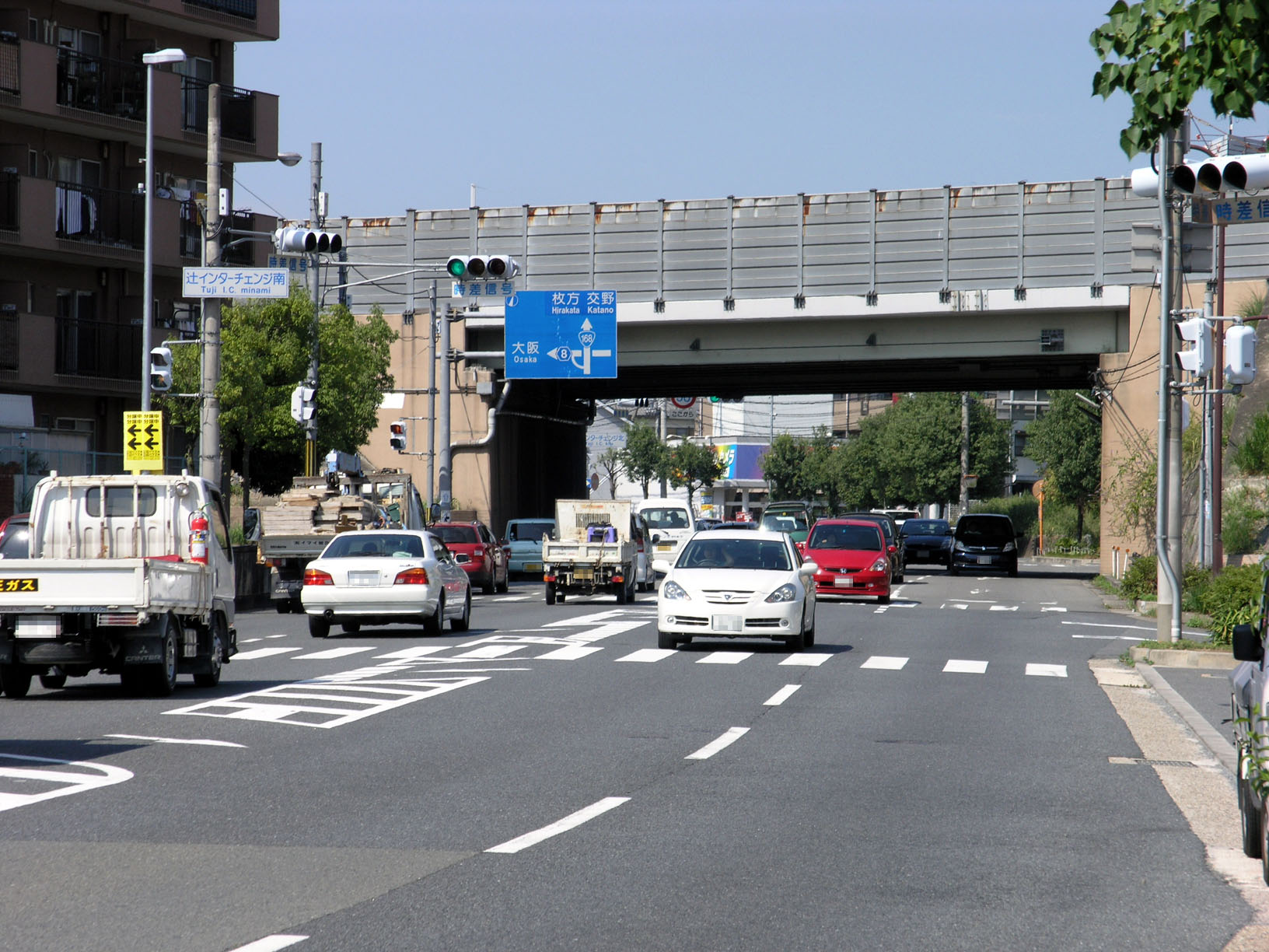 国道168号 (奈良県生駒市) 2008年9月撮影。 機材：C8080WZ 撮影者：Kansai explorer 撮影後レタッチ・リサイズ